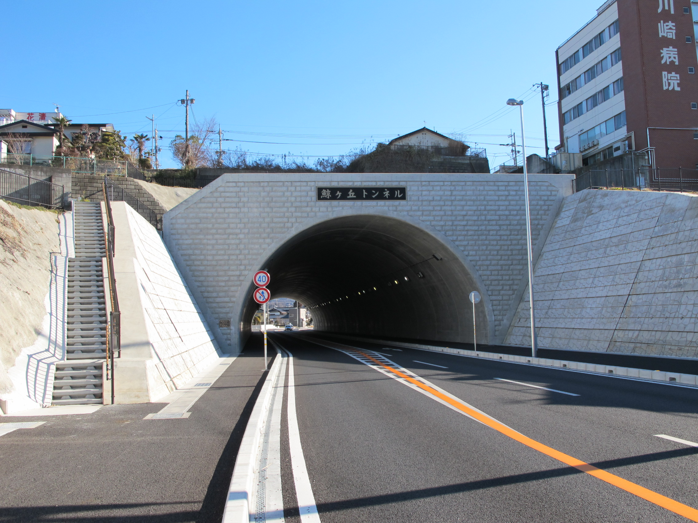 常陸太田市にある鯨ヶ丘トンネル（茨城県道61号日立笠間線）